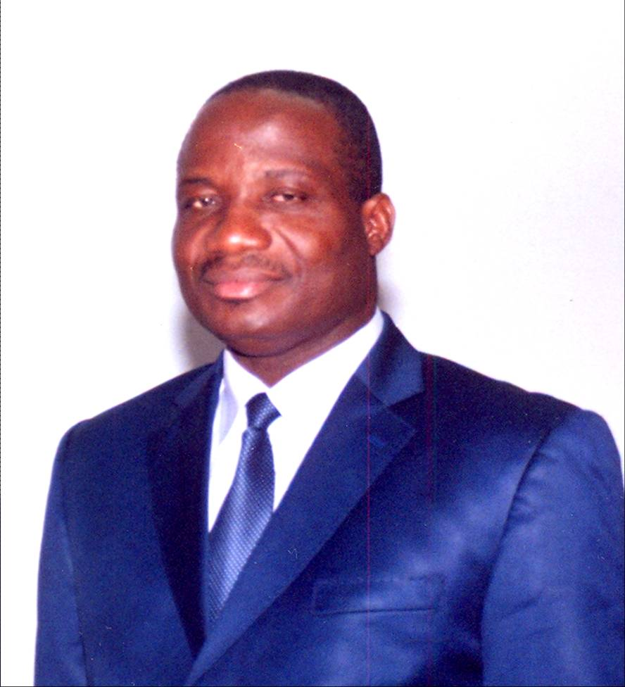 Désiré Asségnini Tagro, Ministre de l'Intérieur de Côte d'Ivoire